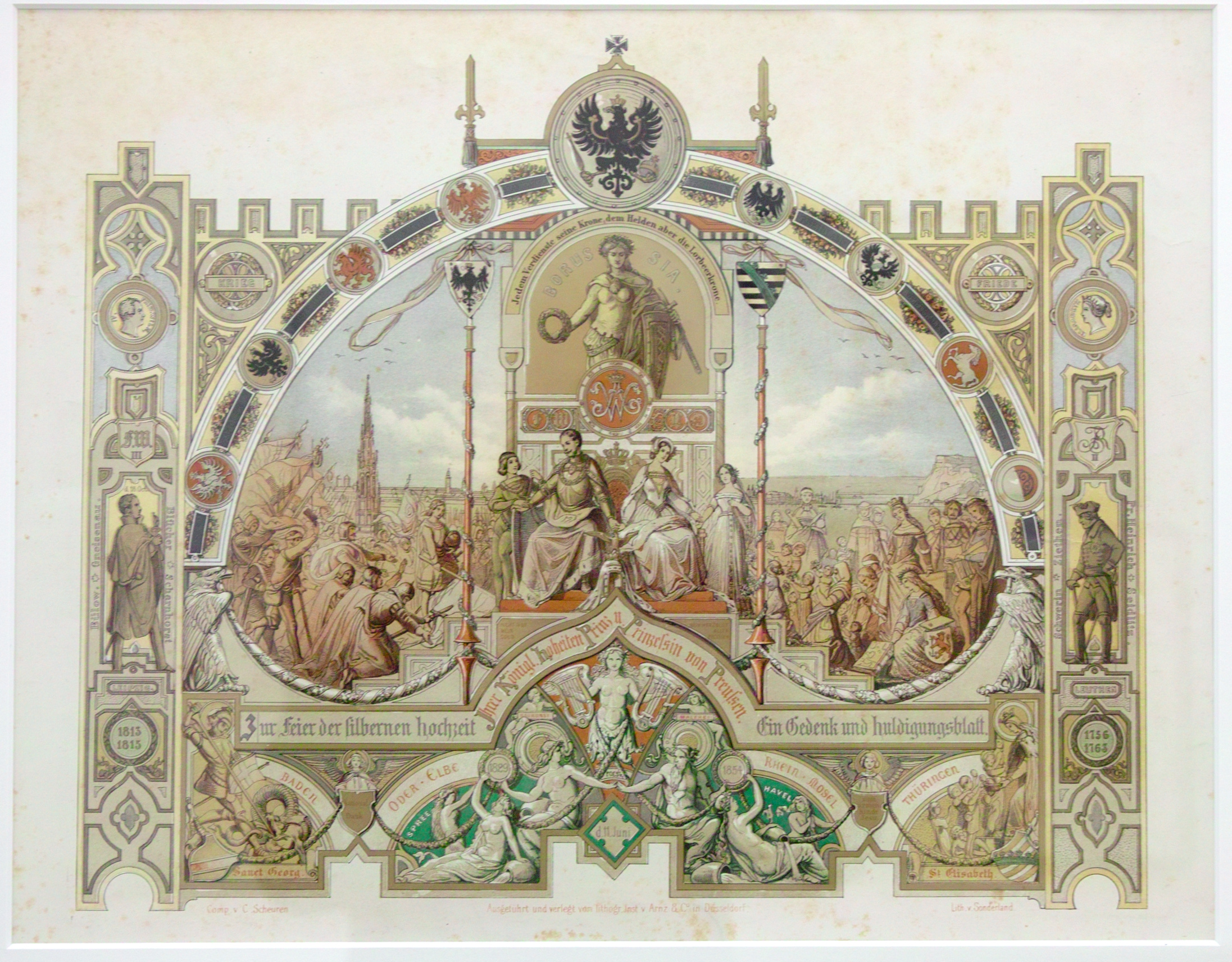 MKG: Caspar Scheuren. Zur Feier der Silbernen Hochzeit Ihrer Königlichen Majestäten Prinz und Prinzessin von Preußen. 'Ausgeführt und verlegt v. Arnz& Co.' Chromolithografie, Düsseldorf 1864. Sonderausstellung Museum für Kunst und Gewerbe, Hamburg Als Kitsch noch Kunst war.